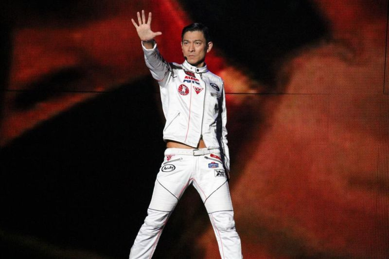 刘德华2011年4月30日天津演唱会现场图